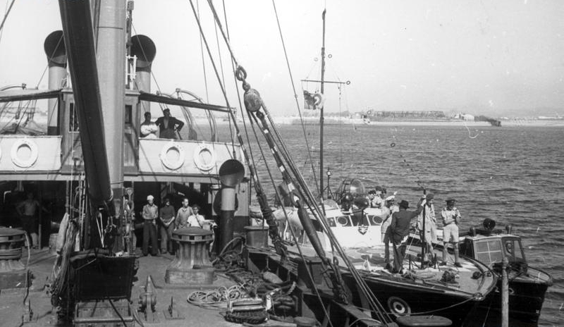 Statki w miejscu katastrofy samolotu, którym leciał gen. Władysław Sikorski. (Gibraltar)